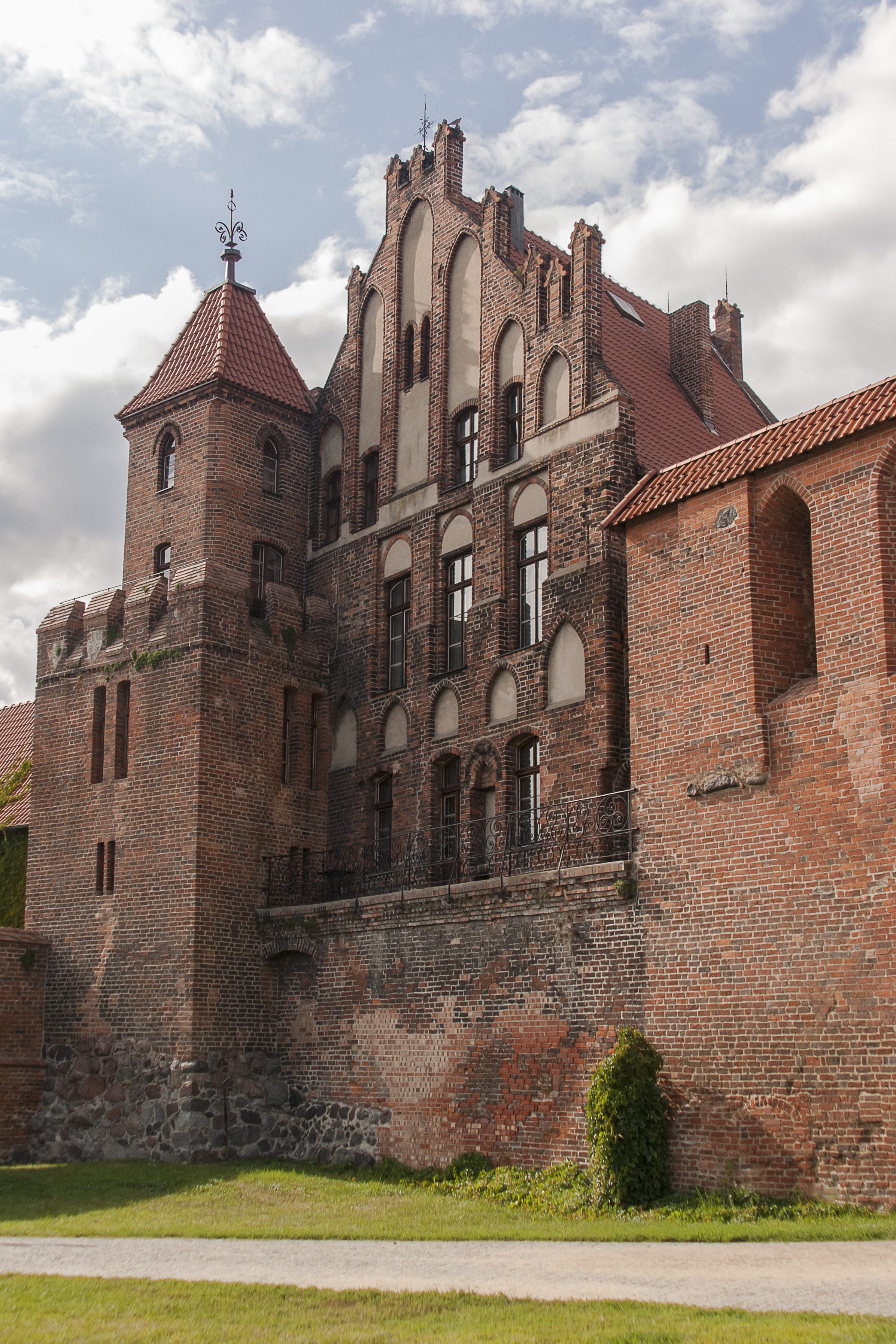 Dwór mieszczański, od strony bulwaru filadelfijskiego